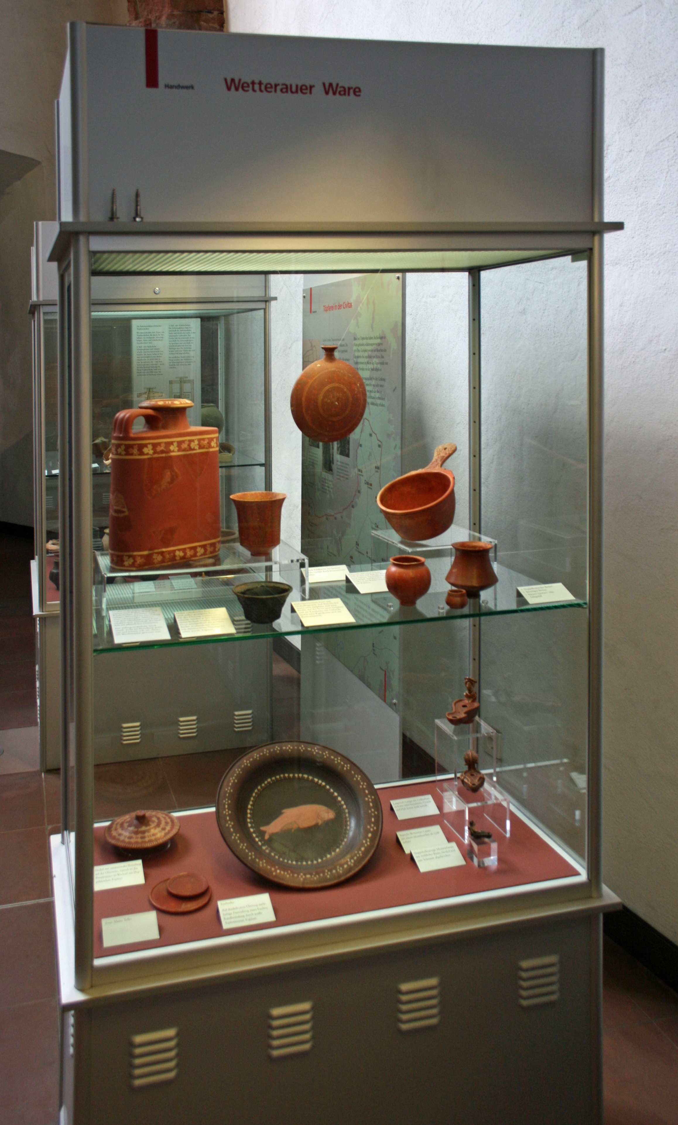 Sogenannte "Wetterauer Ware", Eine Terra Sigillata-Imitation aus dem Rhein-Main-Gebiet im Archäologischen Museum Frankfurt a.M.. Mit freundlicher Genehmigung des Museums.